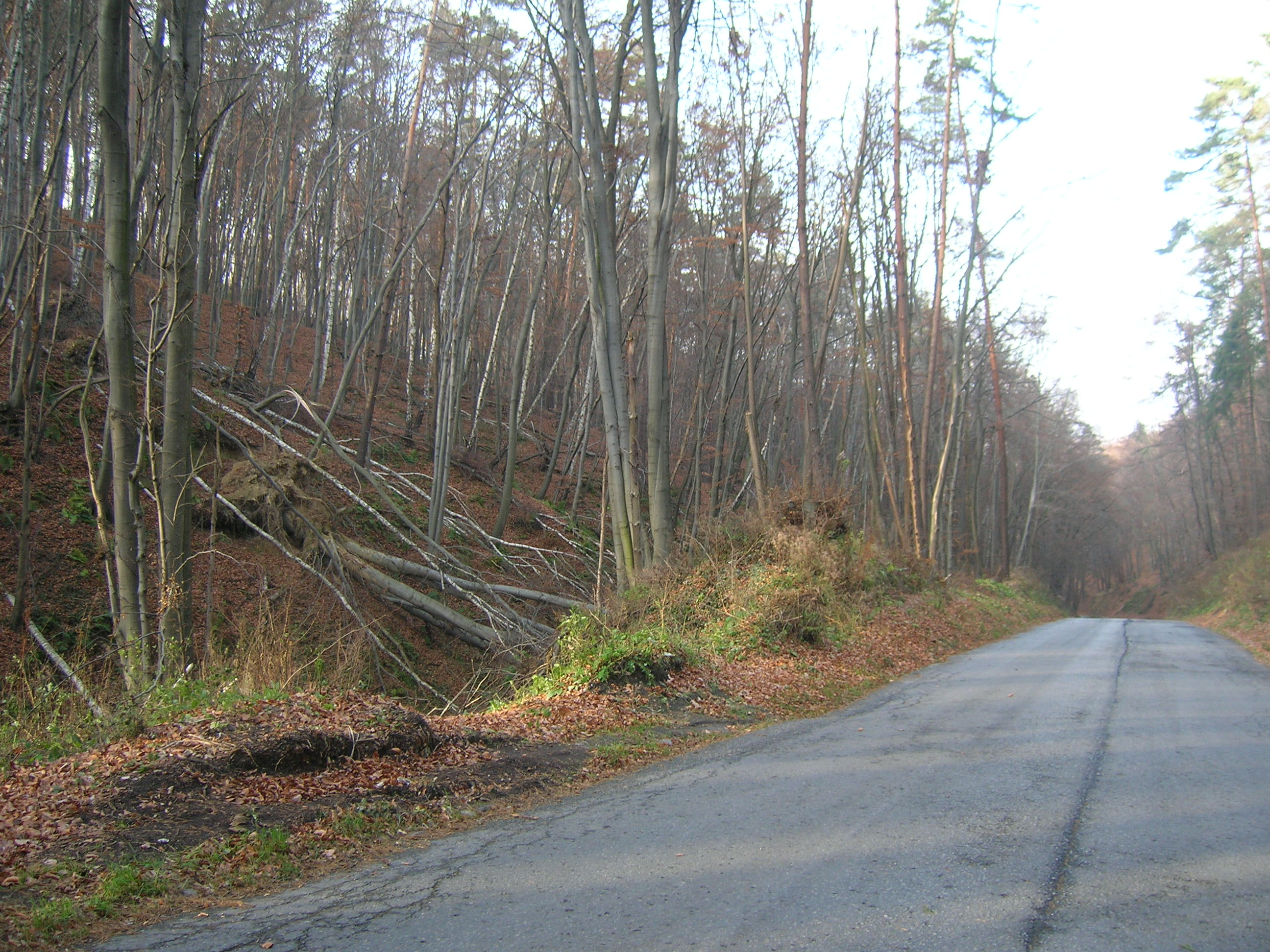 Wąwóz Kochanowski.Fragment półudniowy (górny)